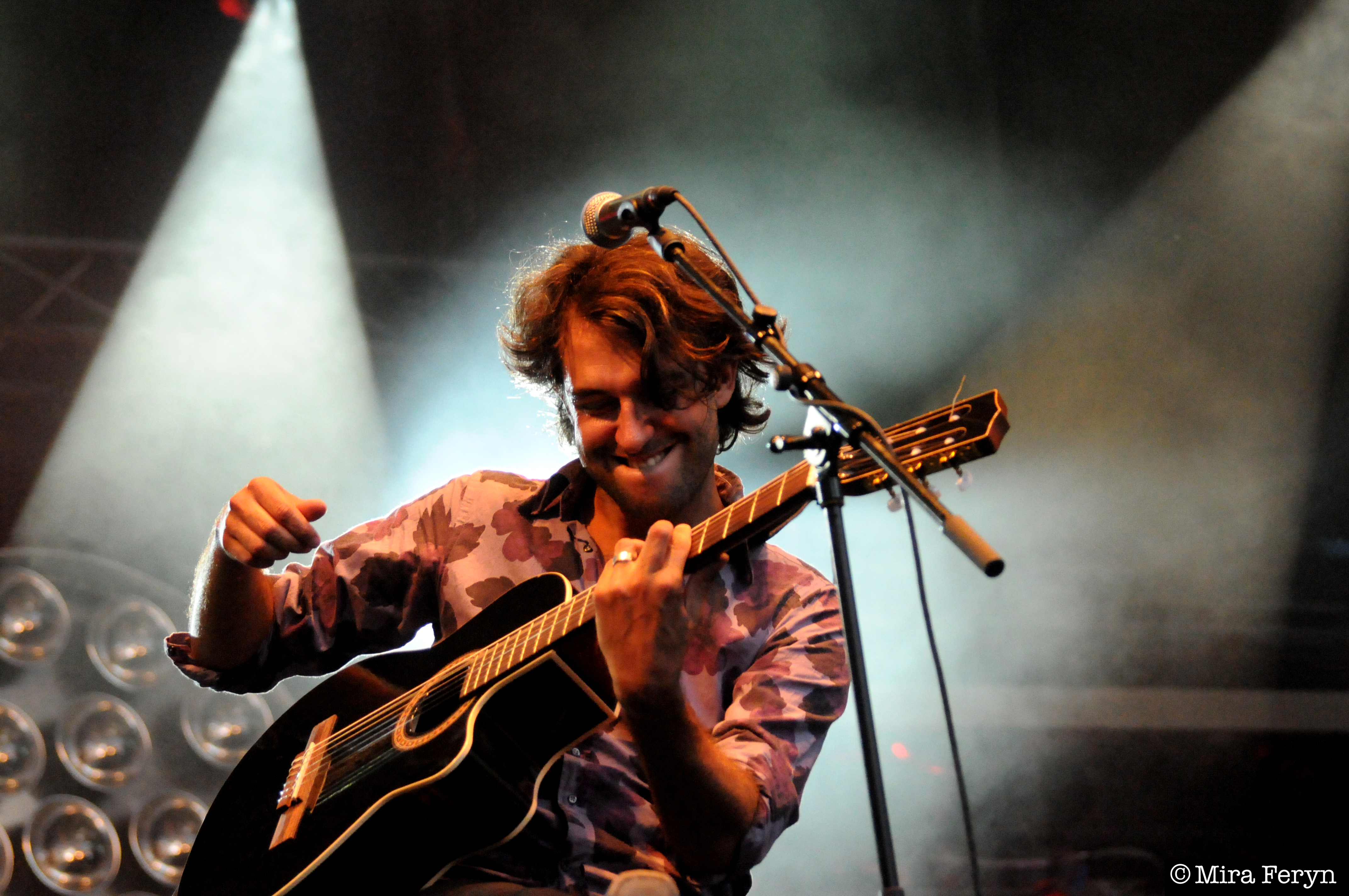 frontman Lennaert Maes van Lenny en de Wespen tijdens Gentse Feesten 2008 op het Sint-Baafsplein